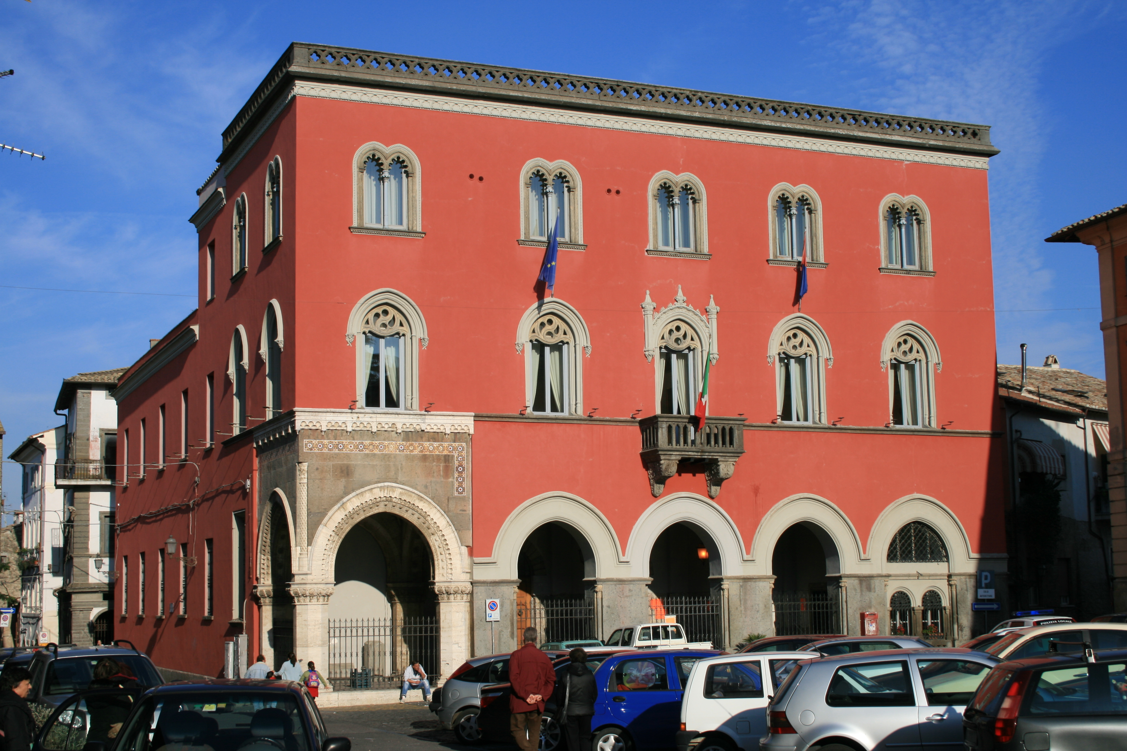 Municipio di Campagnano di Roma